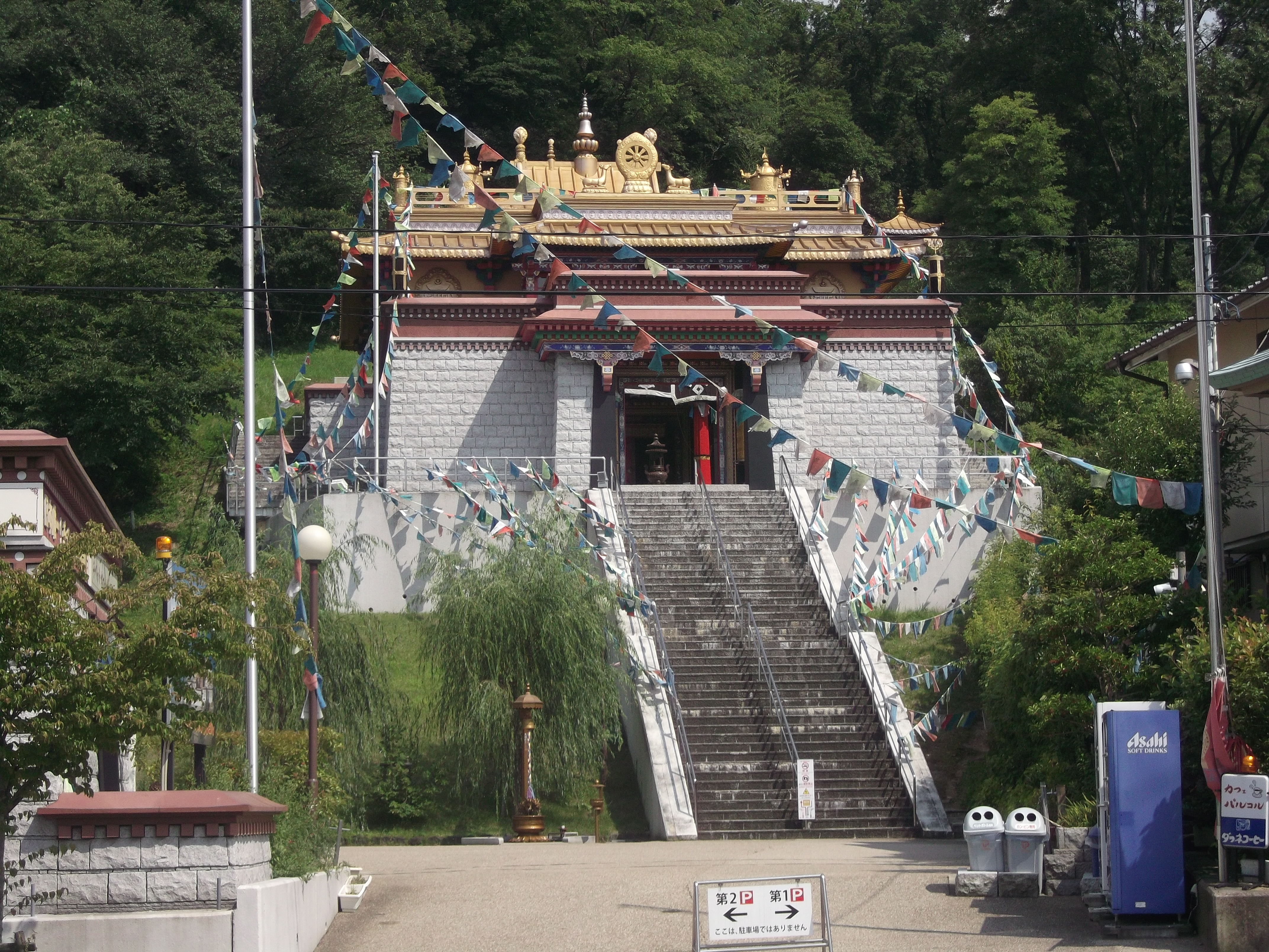 名古屋市守山区青葉台のチベット仏教寺院強巴林を北側公道より撮影